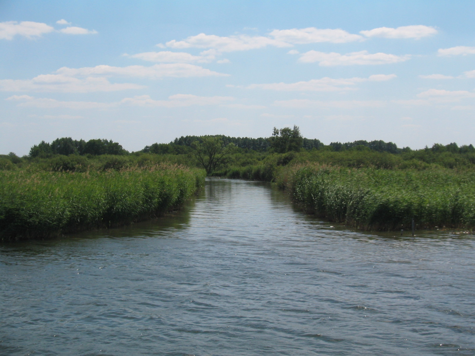 Uckerkanal (Kanal) vom Unteruckersee